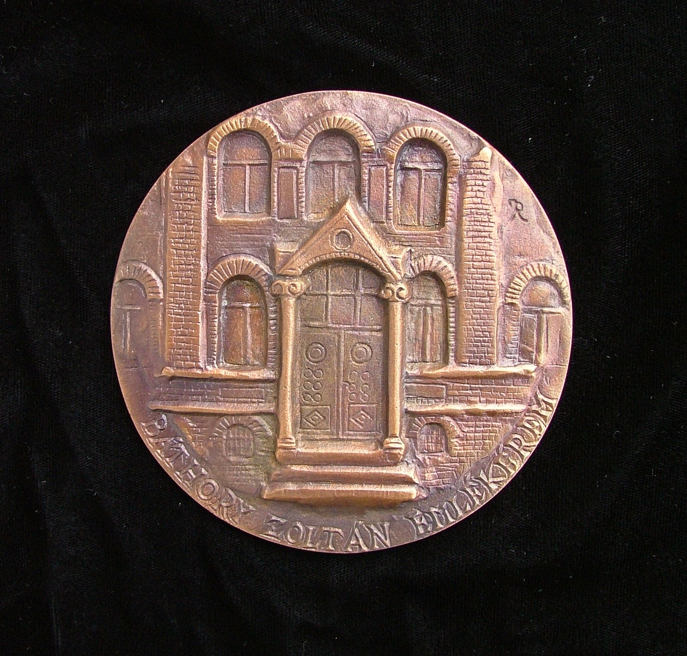 A Magyar Nevelés- és Oktatáskutatók Egyesülete által alapított Báthory Zoltán-emlékérem előlapja, rajta az egykori Országos Pedagógiai Intézet (ma: Budapest-Fasori Evangélikus Gimnázium) homlokzata. Juha Richárd alkotása